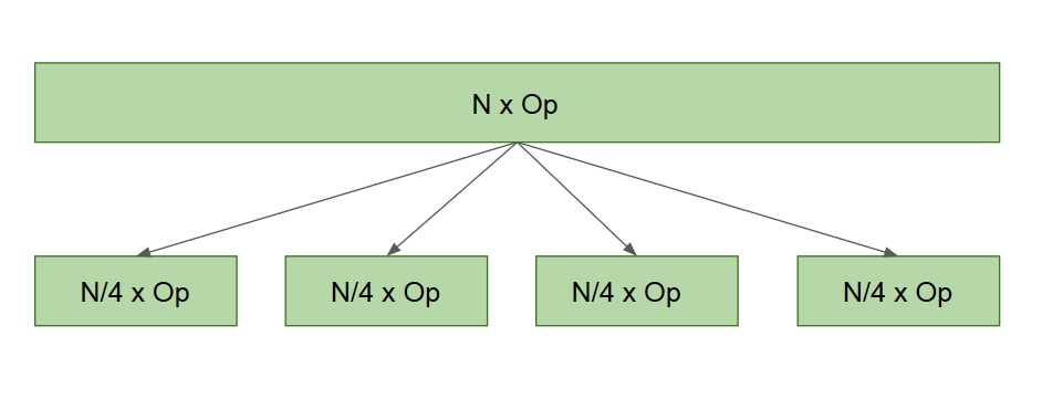 Gràfic paral·lel